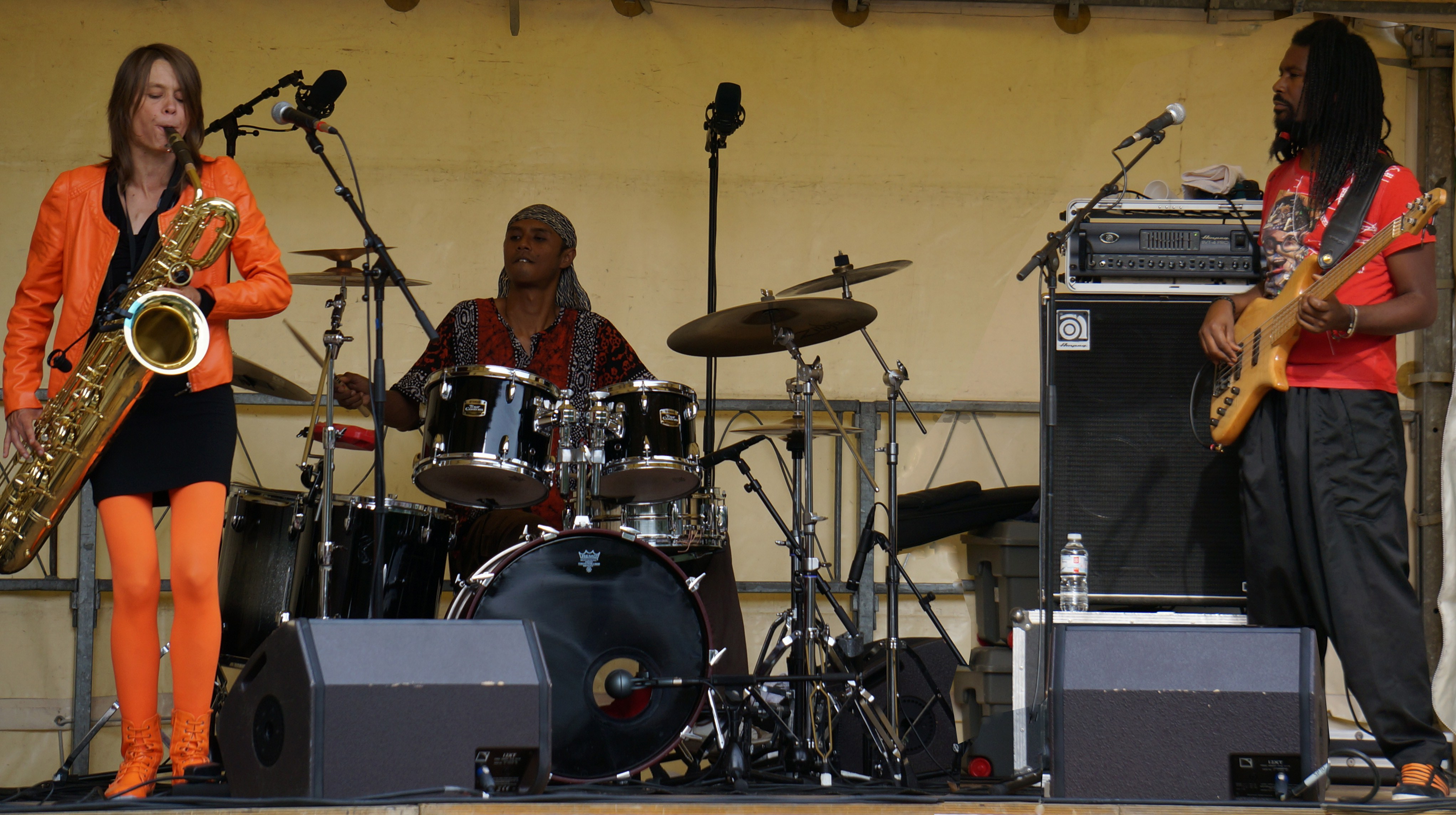 Céline_Bonacina_trio (Céline Bonacina, Hary Ratsimbazafy (batterie), Olivier Carole (basse)) au square Colbert.